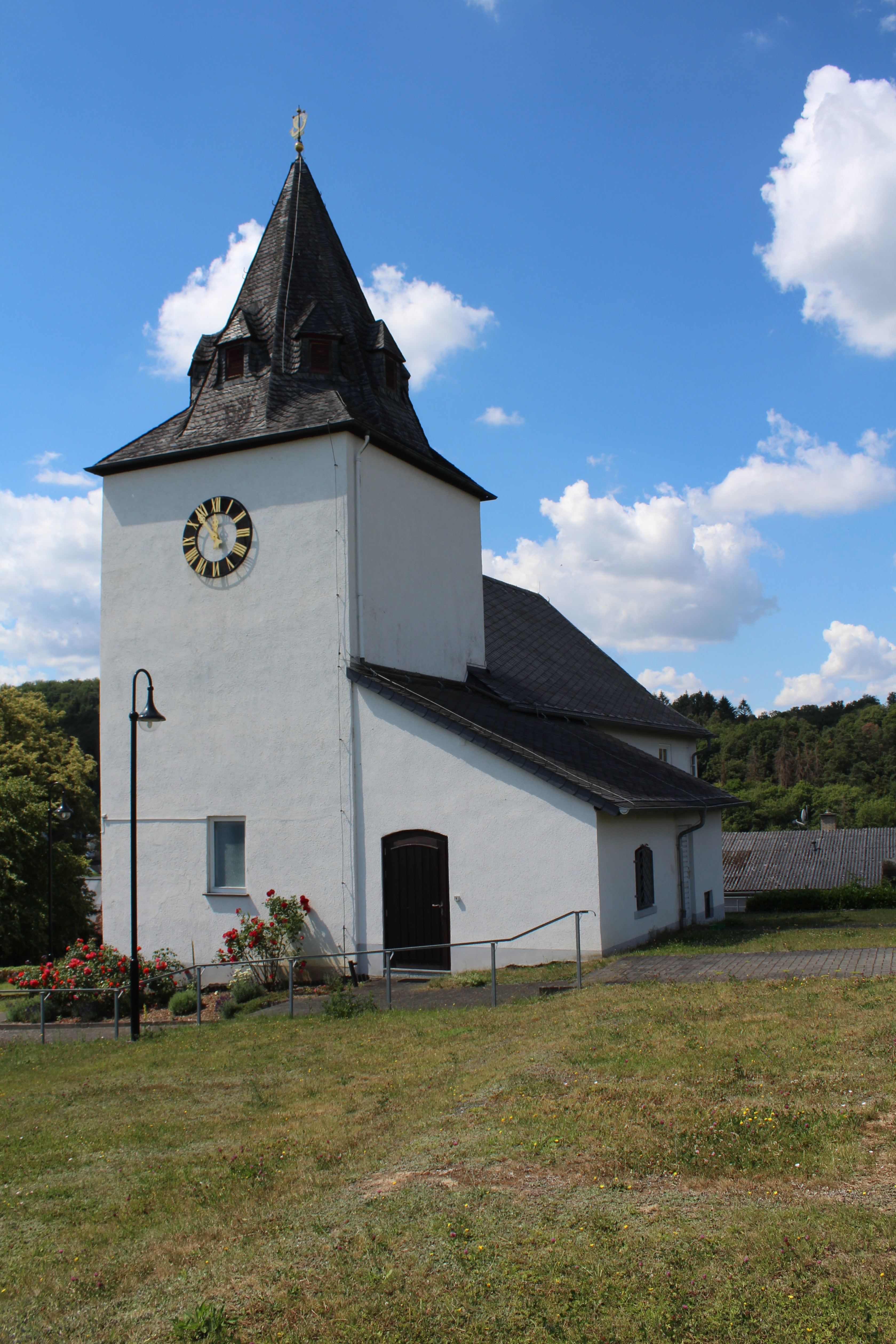 Evangelische Kirche Neukirchen, Braunfels, Lahn-Dill-Kreis, Hessen, Deutschland